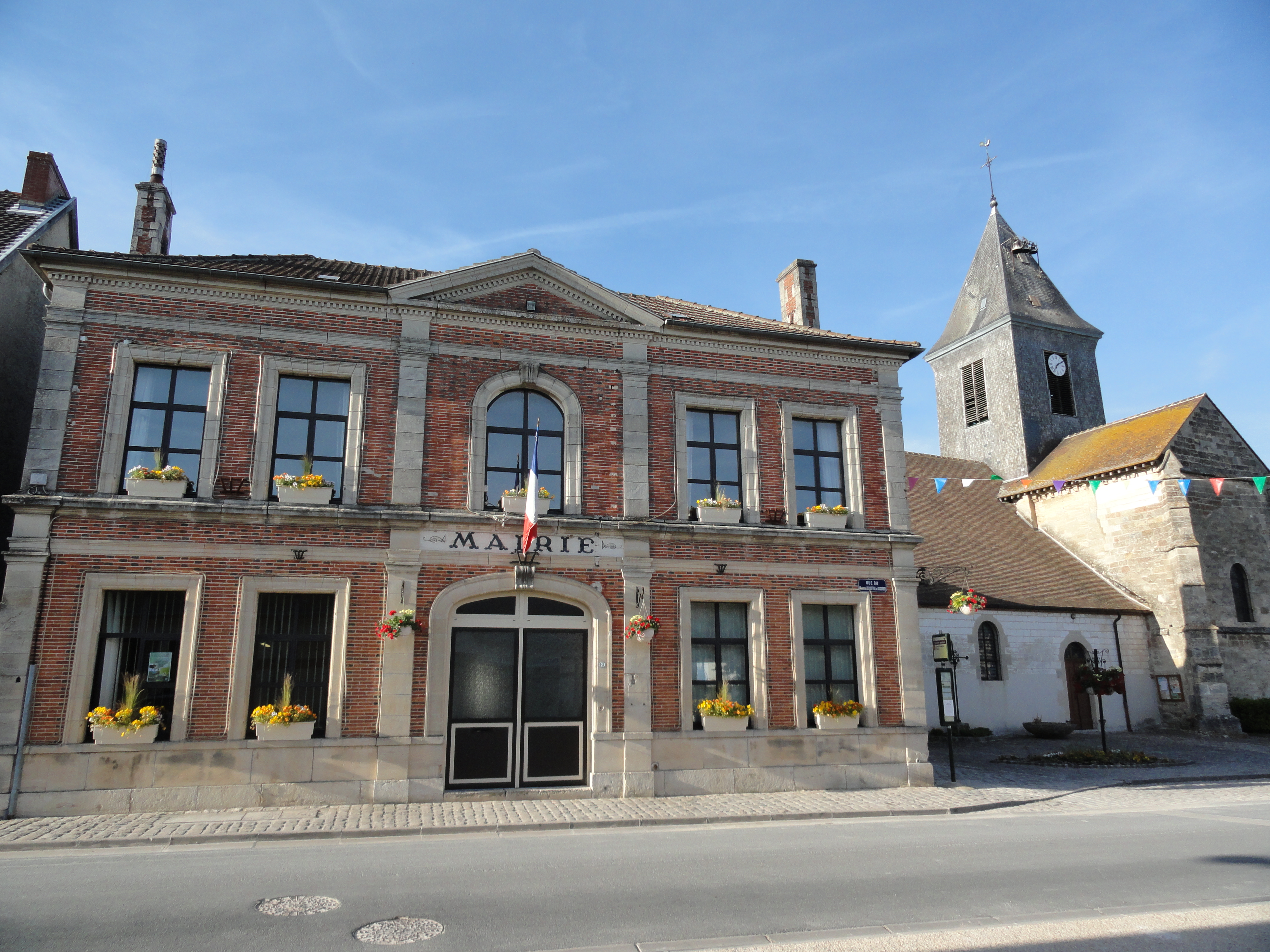 La mairie de Plivot ainsi que l'église Saint-Quentin sur la droite.